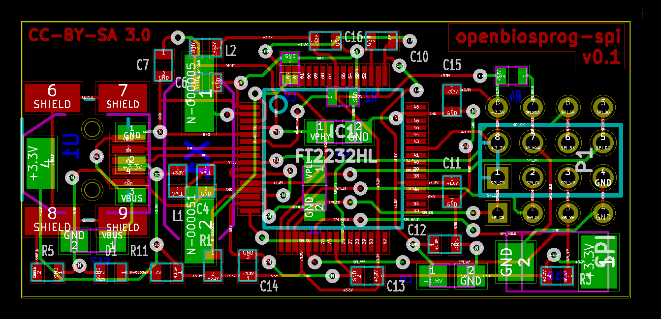 openbiosprog-spi PCB in Kicad.